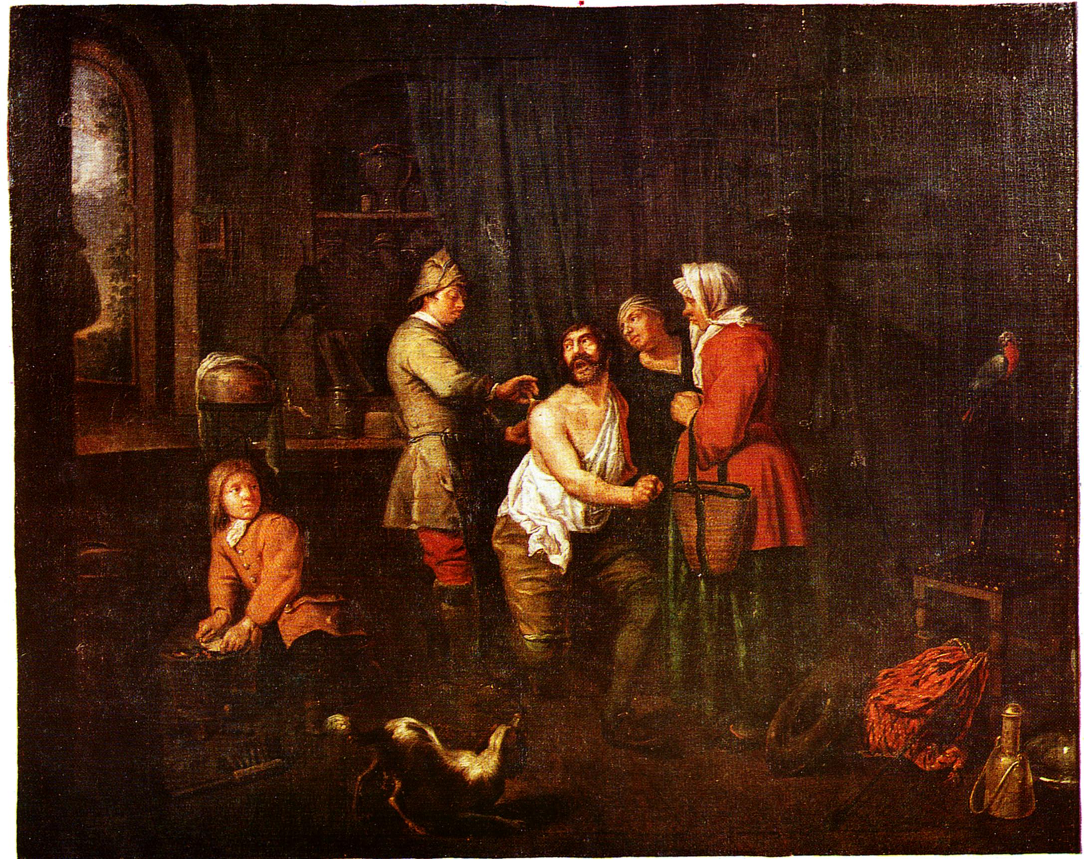 From source: 37. Balthasar van den Bossche: „Das Ordinationszimmer des Chirurgen" 1707 (Semmelweis-Museum für Medizingeschichte, Budapest) Neben den gelehrten Doktoren spielten die Chirurgen eine sehr wichtige Rolle. Sie wurden in den meisten Ländern in Zünften ausgebildet und waren Zunftmitglieder. Auf dem dunklen Gemälde von Balthasar van den Bossche (1681-1715), einem 'Maler aus Antwerpen, sieht man gut, wie schmerzhaft die Abnahme des Pflasters ist. Dieses „Ordinationszimmer" wirkt nicht so sehr durch seine Bücher und andere „gelehrten" Einrichtungsgegenstände, als durch eine gewisse mystische Stimmung. Vielleicht dient sogar der farbige Papagei dazu, diese Stimmung zu verstärken.